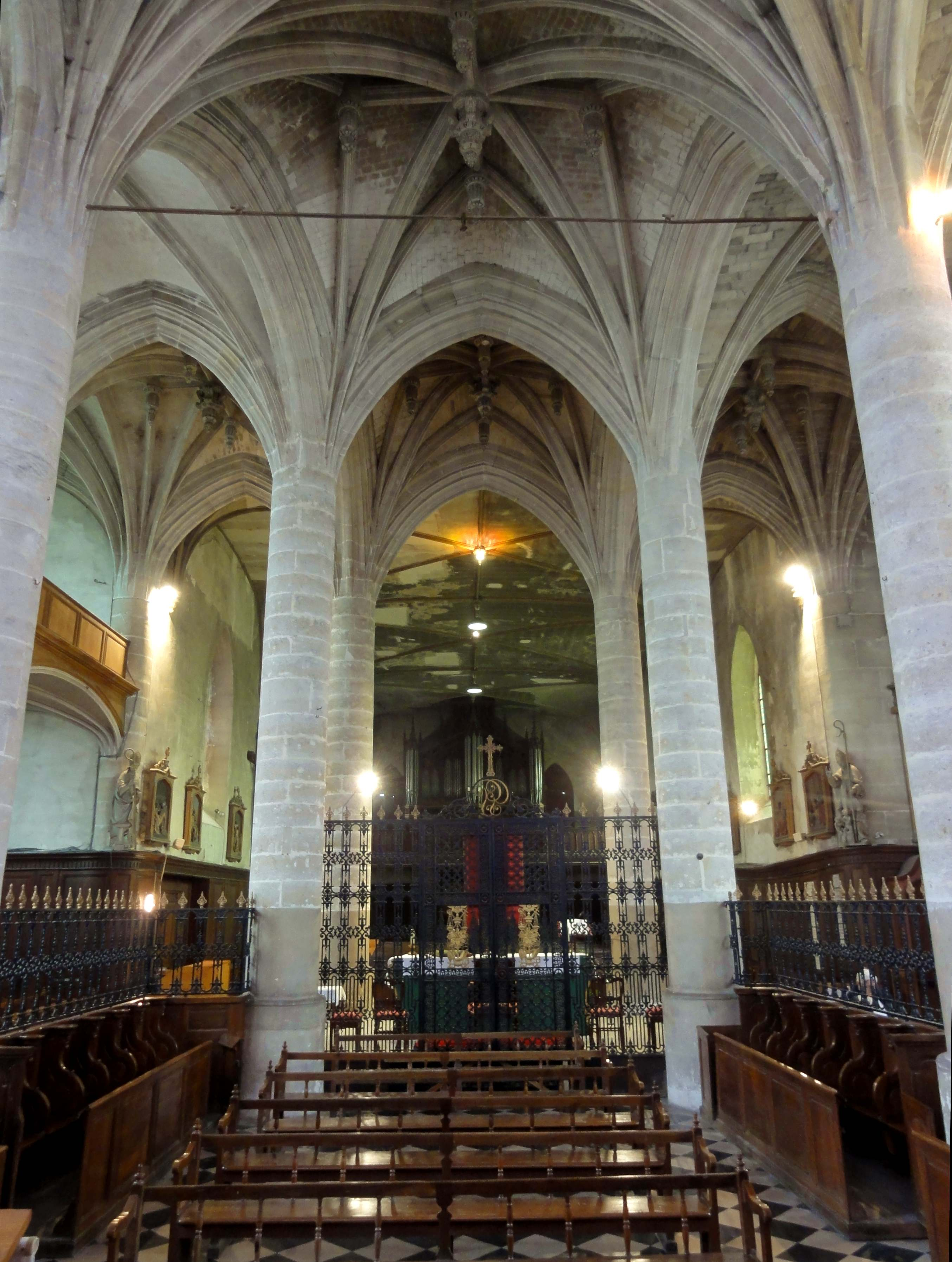 Intérieur de l'église (voir titre).